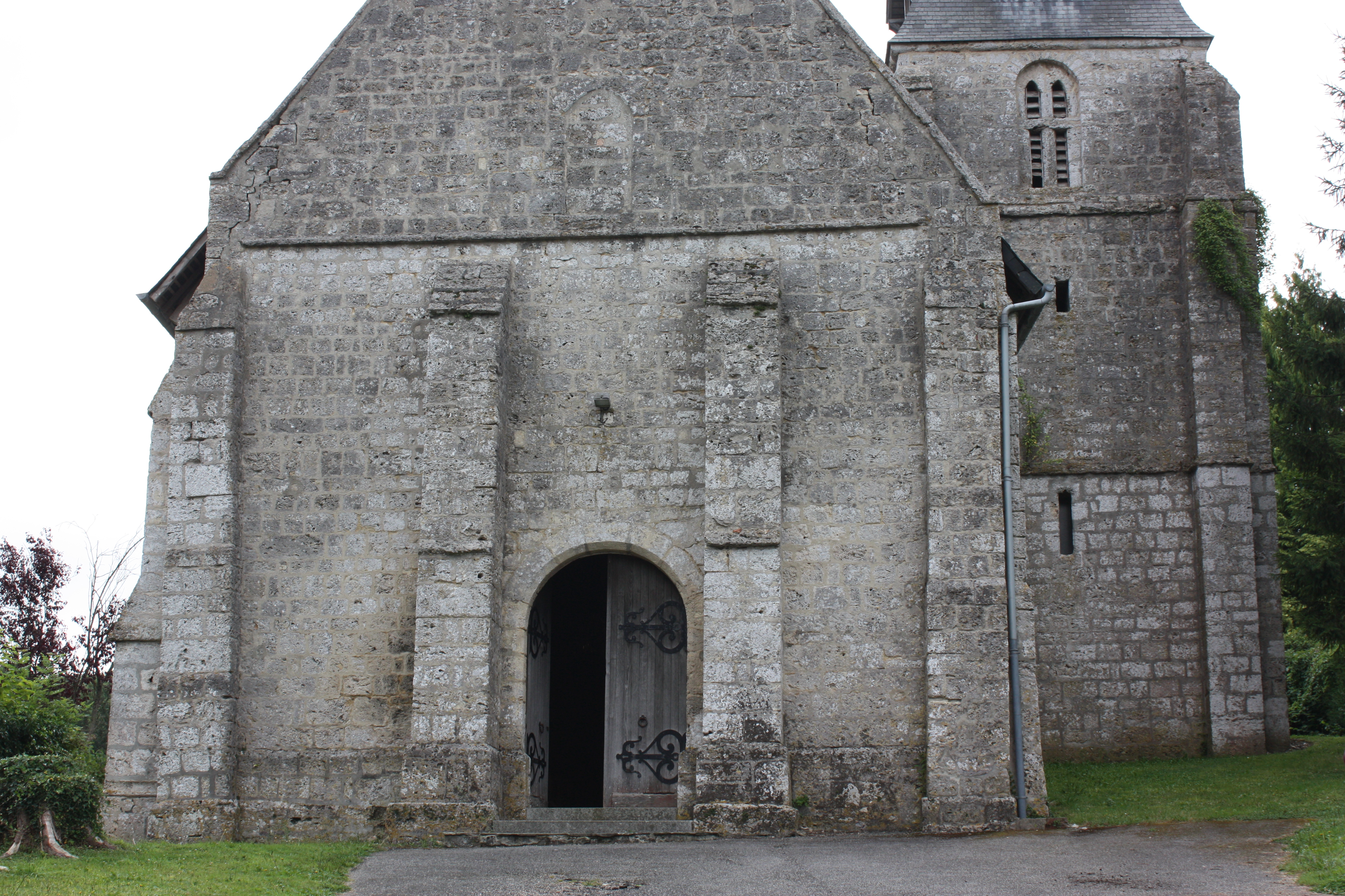 Quetteville - Eglise Saint-Laurent